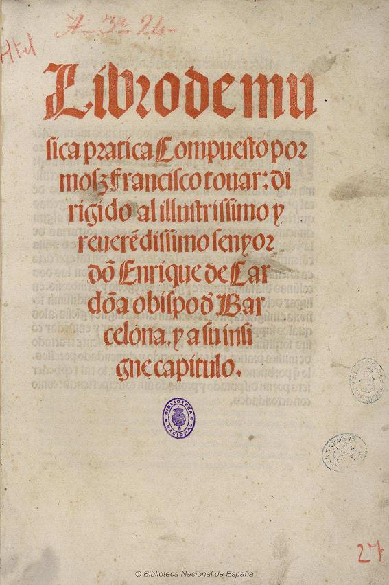 Libro de musica pratica compuesto por el mos[en] Francisco Touar Autor: Francisco Tovar (fl. 1510) Imprimida en ... Barcelona por ... Johan Rose[m]bach.